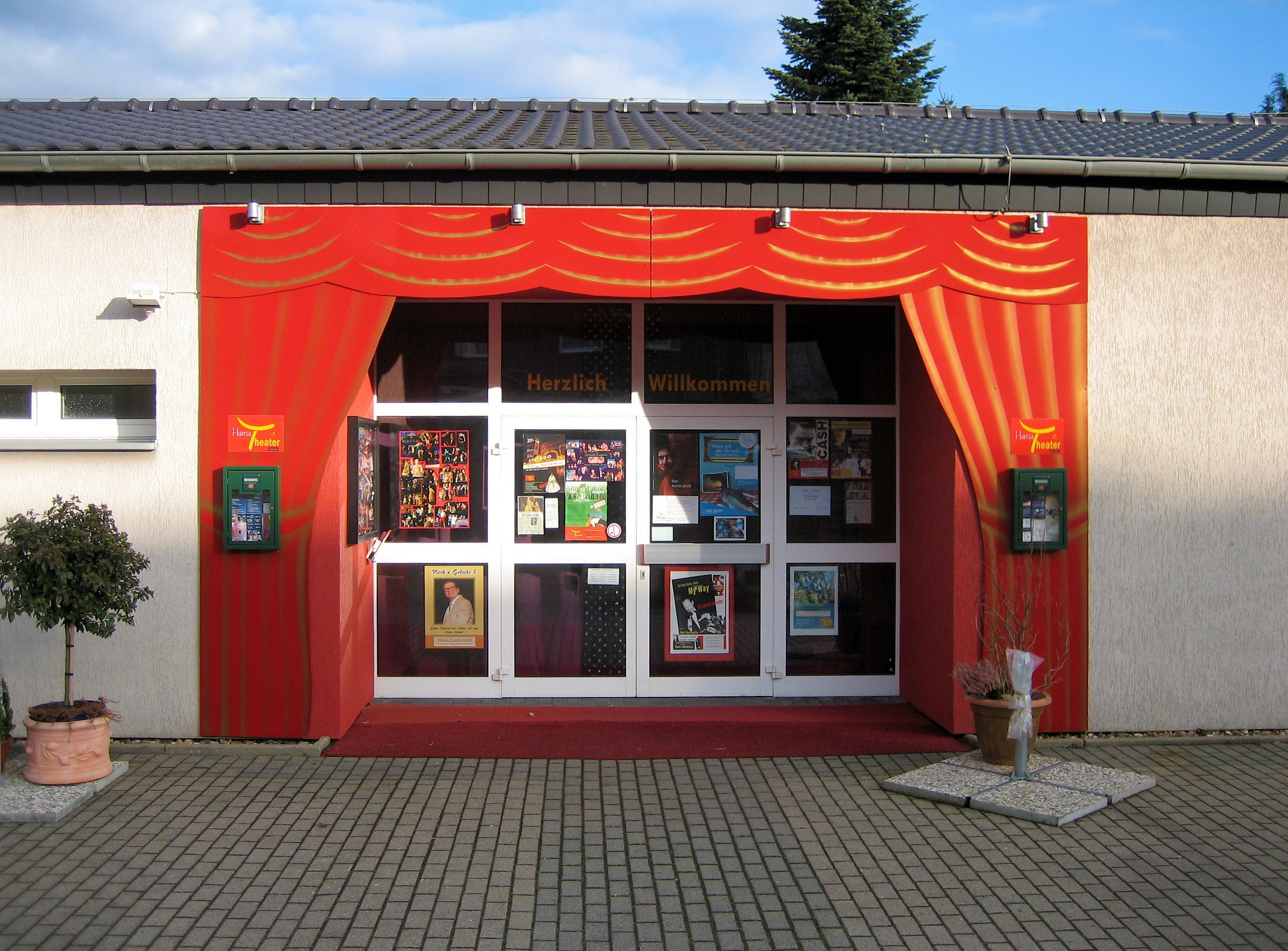 Dortmund, Dortmund-Hörde, Hansa Theater